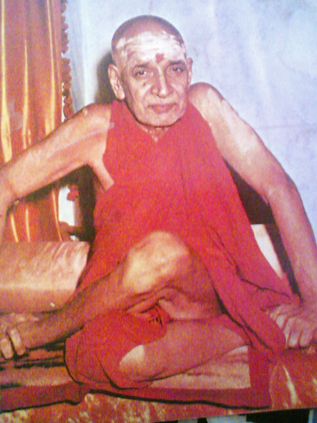 स्वामी करपात्री